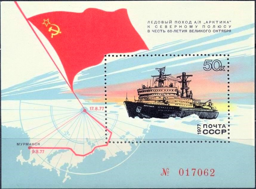 Почтовый блок СССР, посвящённый походу к Северному полюсу в честь 60-летия Великого Октября, проходившему с 9 по 17 августа 1977 года. Выпущен в сентябре 1977 года. На почтовом блоке изображён ледокол «Арктика», впервые в истории достигший Северного полюса, Государственный флаг СССР, схема похода, полярный пейзаж, памятные даты и текст. Номер в каталоге ЦФА — 4745. Художник — А. Аксамит. Тираж — 500000 экземпляров.